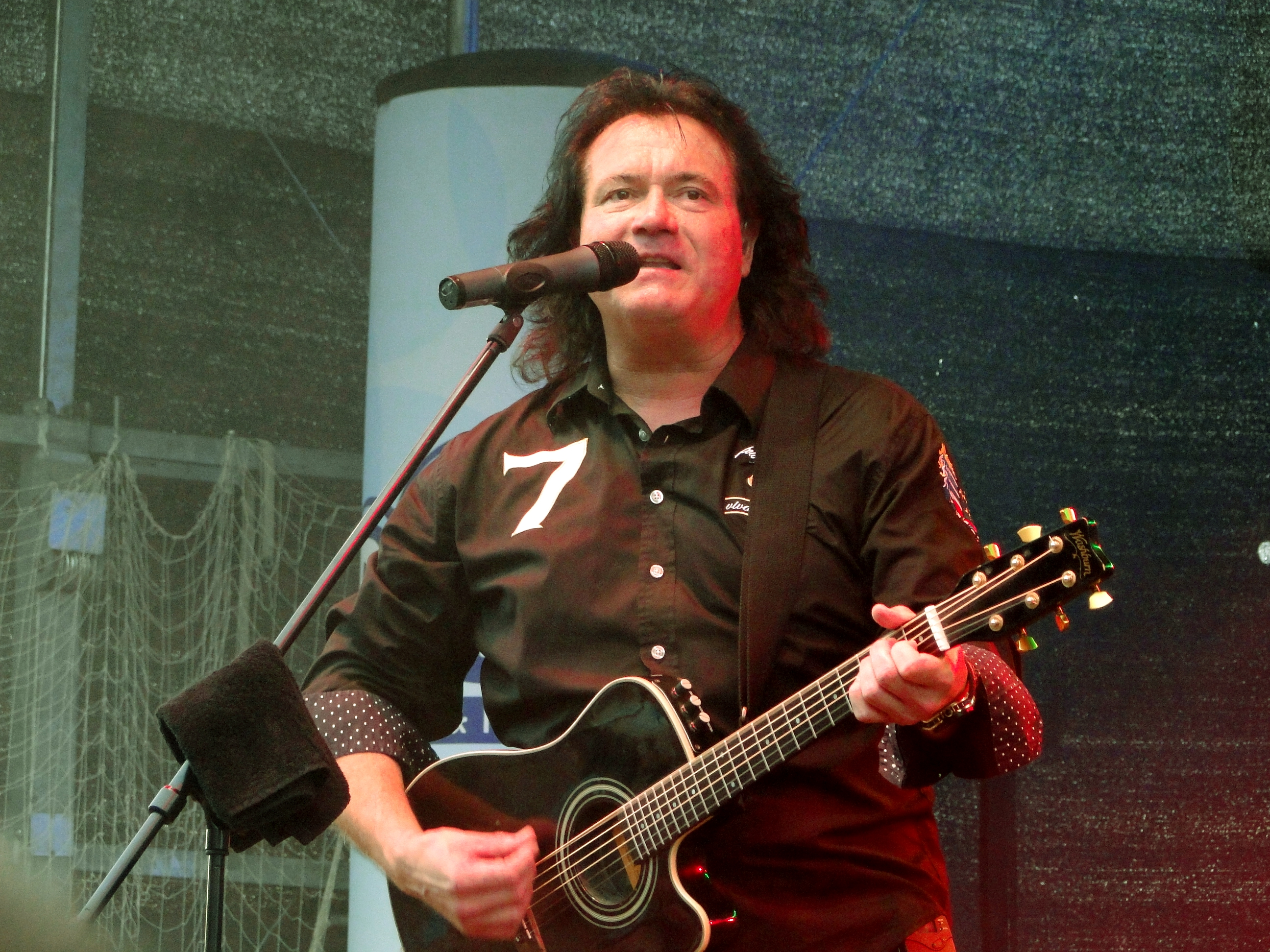 Der deutsche Schlagersänger Andreas Martin während eines Auftrittes in Dresden